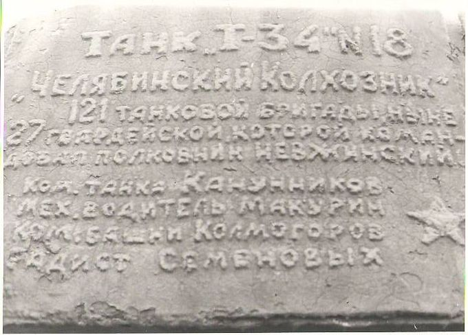 Памятная доска (часть 2) размещённая на танке Т-34 № 18 «Челябинский колхозник» — памятник в Волгограде установленный в честь завершения операции «Кольцо». Памятник является частью Мемориального комплекса «Героям Сталинградской битвы» на Мамаевом кургане.